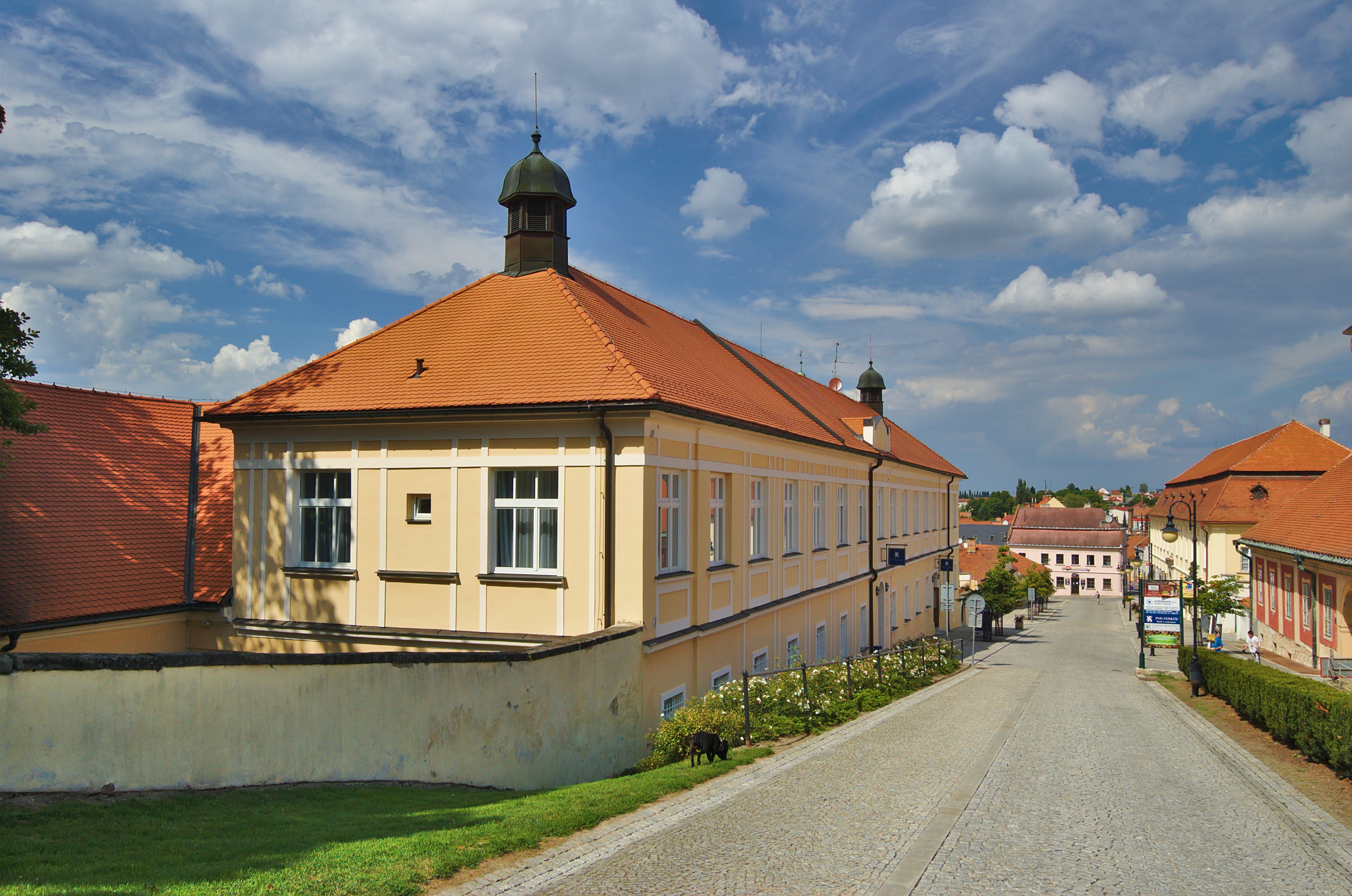 Bývalý klášter milosrdných sester svatého Vincence z Pauly, Boskovice, okres Blansko